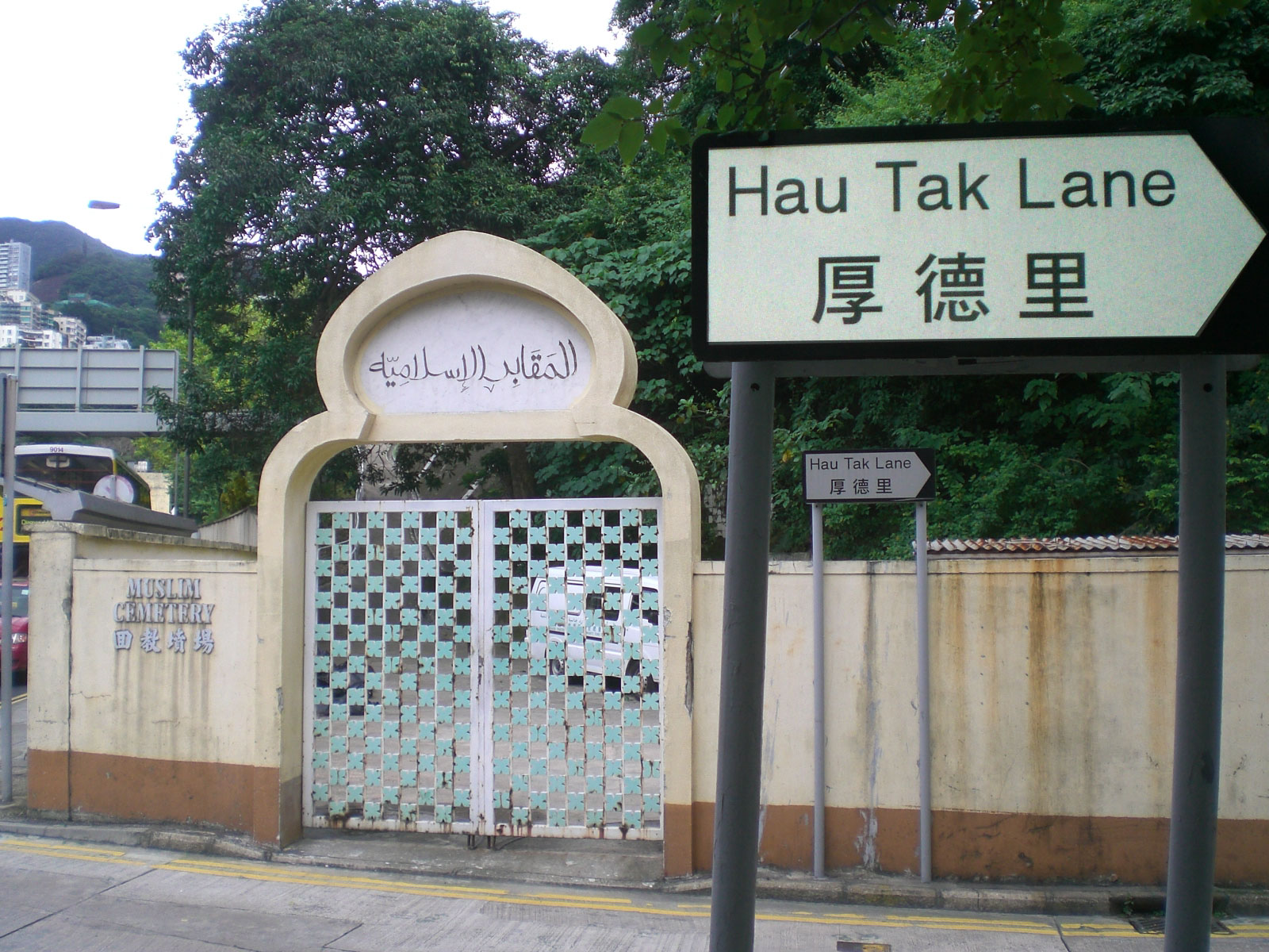 跑馬地回教墳場